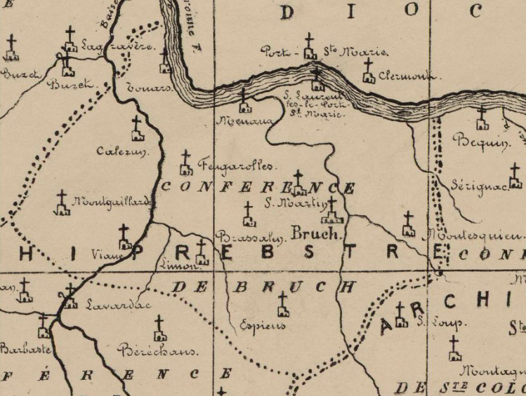 Extrèit de la mapa de la diocèsi de Condòm: Jean-Marie Cazauran (1845-1910). Diocèse de Condom au XVIIe siècle.